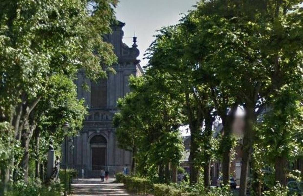 place du Parc avec la chapelle des Visitandines